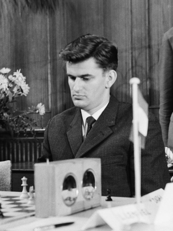 Fide schaaktoernooi 1963. 30 K. Darga.